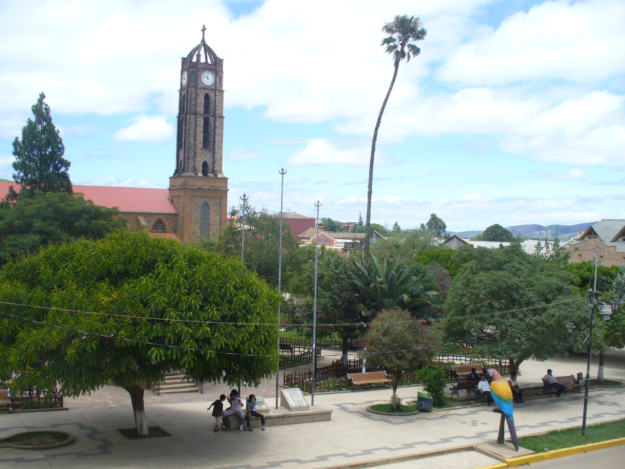 vista parcial de la plaza principal de la ciudad de Vallegrande, Bolivia.